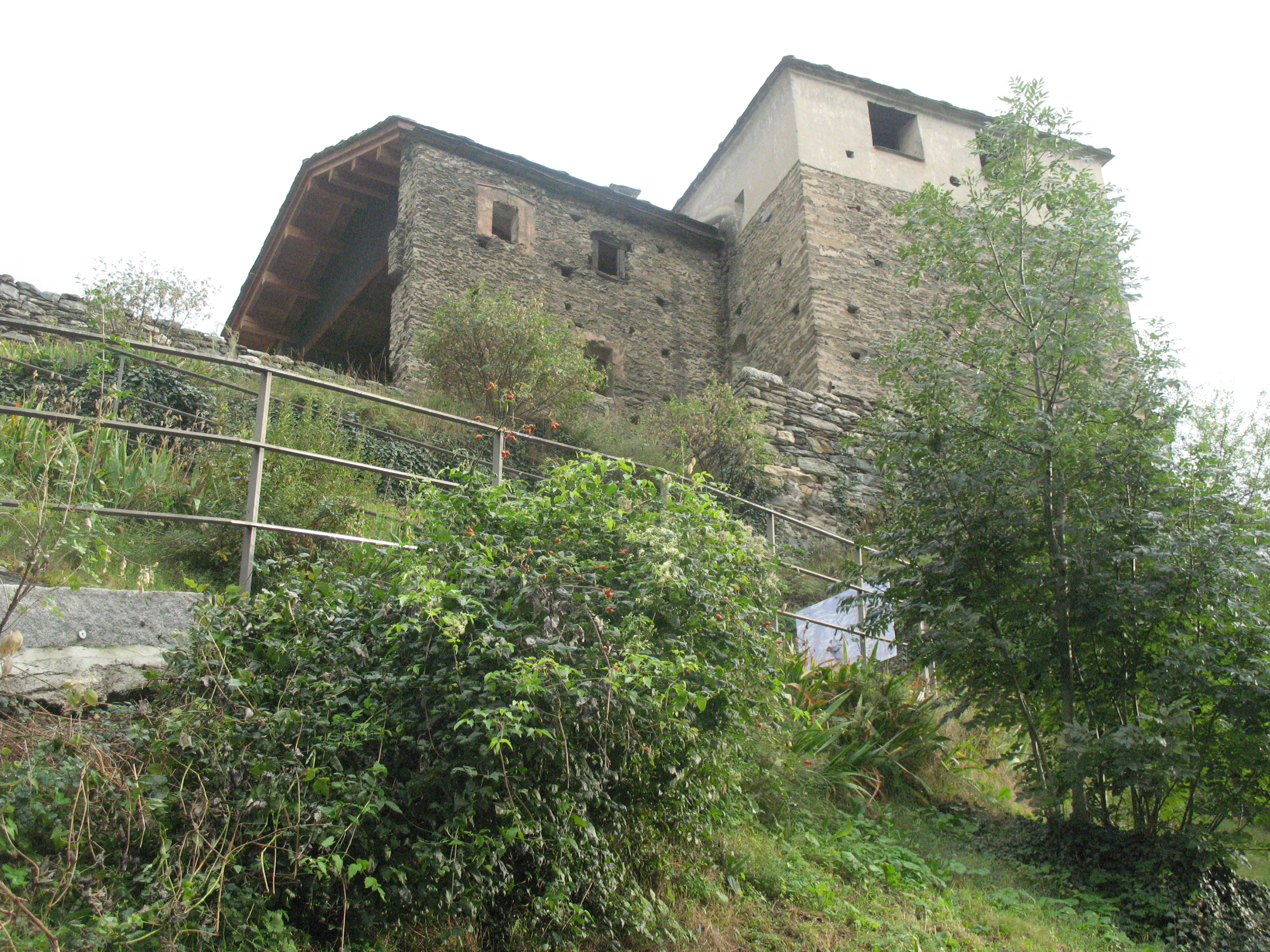 Замок де ла Моте в Арвье в 2014 году